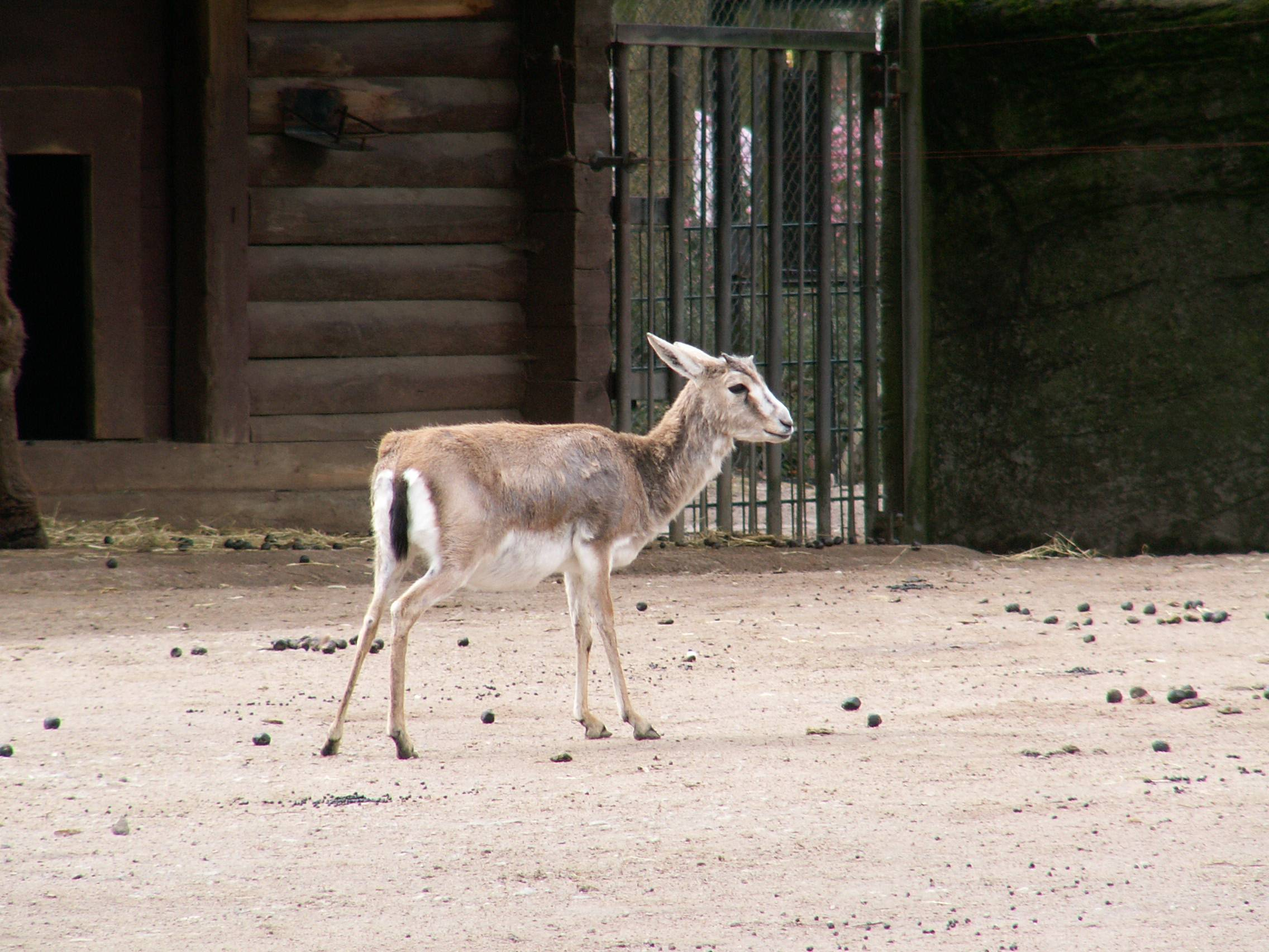 Gazella subgutturosa subgutturosa, Geiß, Persische Kropfgazelle, aufgenommen in Hagenbecks Tierpark, Hamburg, Deutschland.